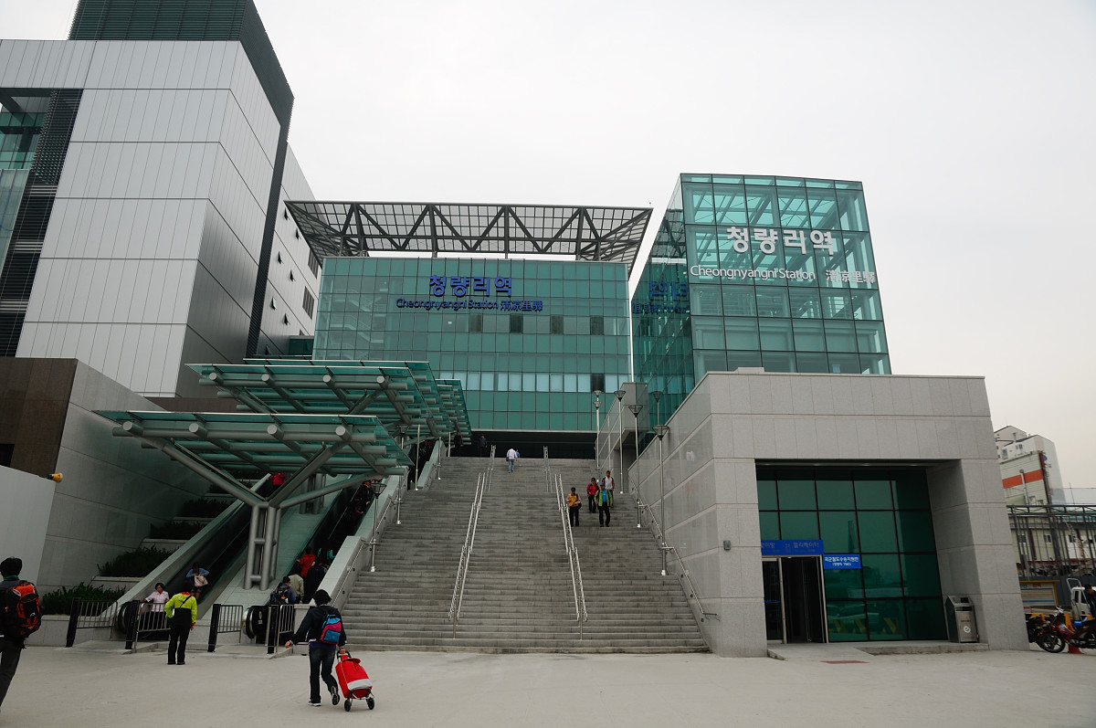 쳥량리역